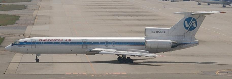 関西国際空港にて撮影したウラジオストク航空のTu-154M